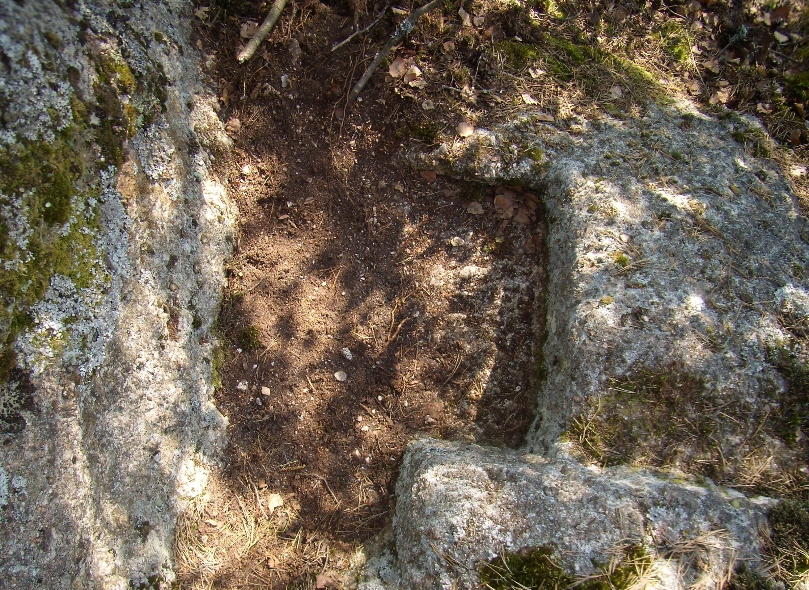 Burgstall Strafenberg (Pfostenlöcher)